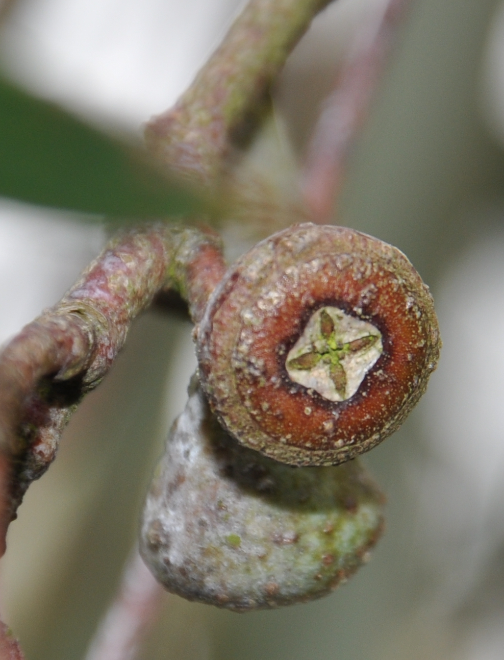 Fruit d'Eucalyptus coccifera au Jardin exotique de Roscoff le 17/05/2012.